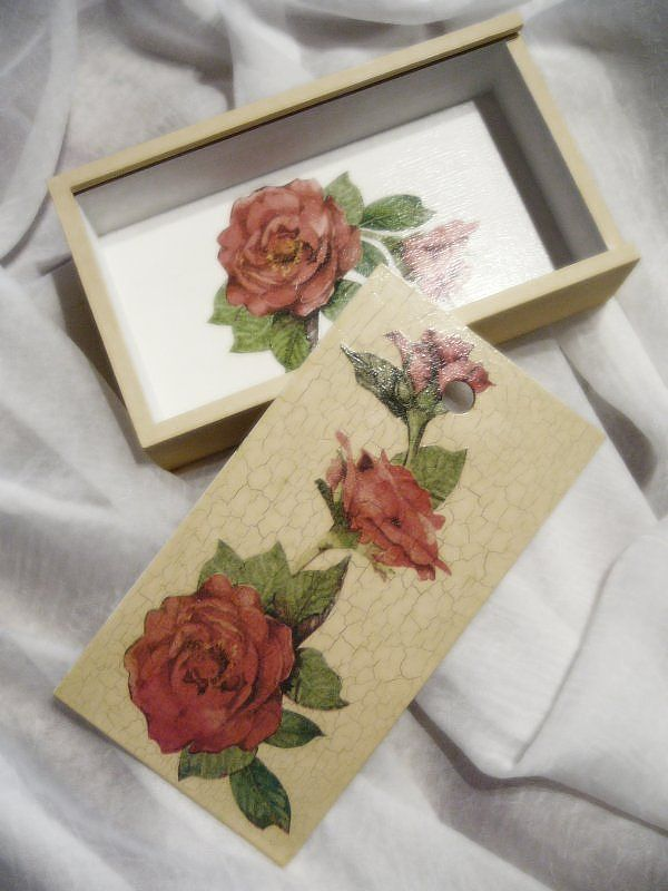 Pudełko drewniane ozdobione techniką découpage.